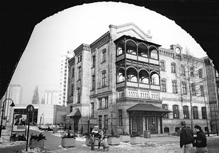 "Für Bezieher des ADN-Reportagedienstes! Zum Beitrag: Viel Spaß in alten Gaswerk-Gebäuden - Attraktives programm des Kulturhauses im Ernst-Thälmann-Park ADN-ZB-Settnik-13.2.1987-bb Drei fast hundertjährige Verwaltungs- bzw. Fabrikgebäude des ehemaligen Gaswerks an der Dimitroffstraße in Berlin, auf dessen Gelände in den vergangenen Jahren ein schönes Wohngebiet für rund 4.000 Bürger entstand, wurden erhalten und für ihre neue Funktion als Kultur- und Freizeitstätten hergerichtet. Ein Neubau, die "Wabe", kam hinzu. Unser Bild zeigt das Klubhaus und im Hintergrund den Flachhbau der "Wabe". Das Klubhaus, das zum Kulturhaus im Ernst-Thälmann-Park gehört, beherbergt im Erdgeschoß einen Ausstellungsraum, in der ersten Etage den Jugendklub und darüber das "Theater unterm Dach"! (Hierzu gehören die Fotos 1987-0213-300N-305N!)"